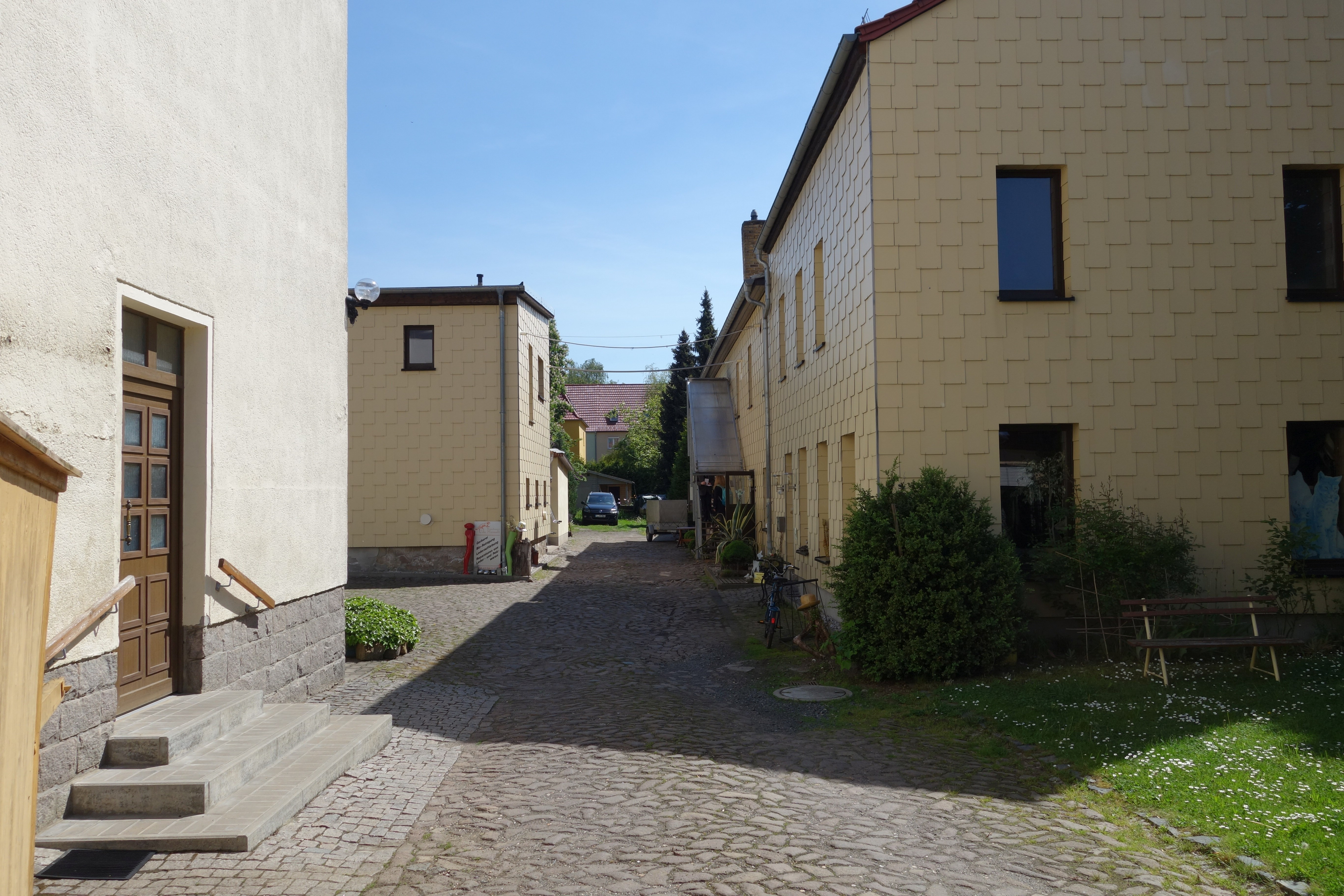 Hofgebäude der Kürschnerei und Pelz-Zurichterei Udo Meinelt (rechts das im Jahr 2002 renovierte Hauptgebäude).